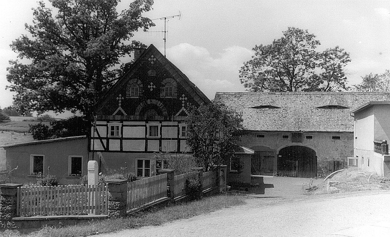 Original image description from the Deutsche Fotothek Panschwitz-Kuckau-Cannewitz. Wassermühle